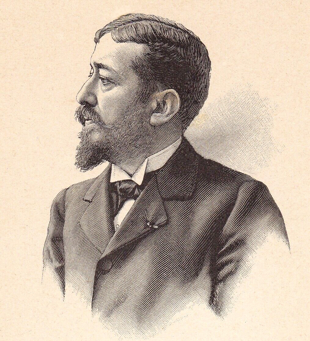 Ulpiano Checa